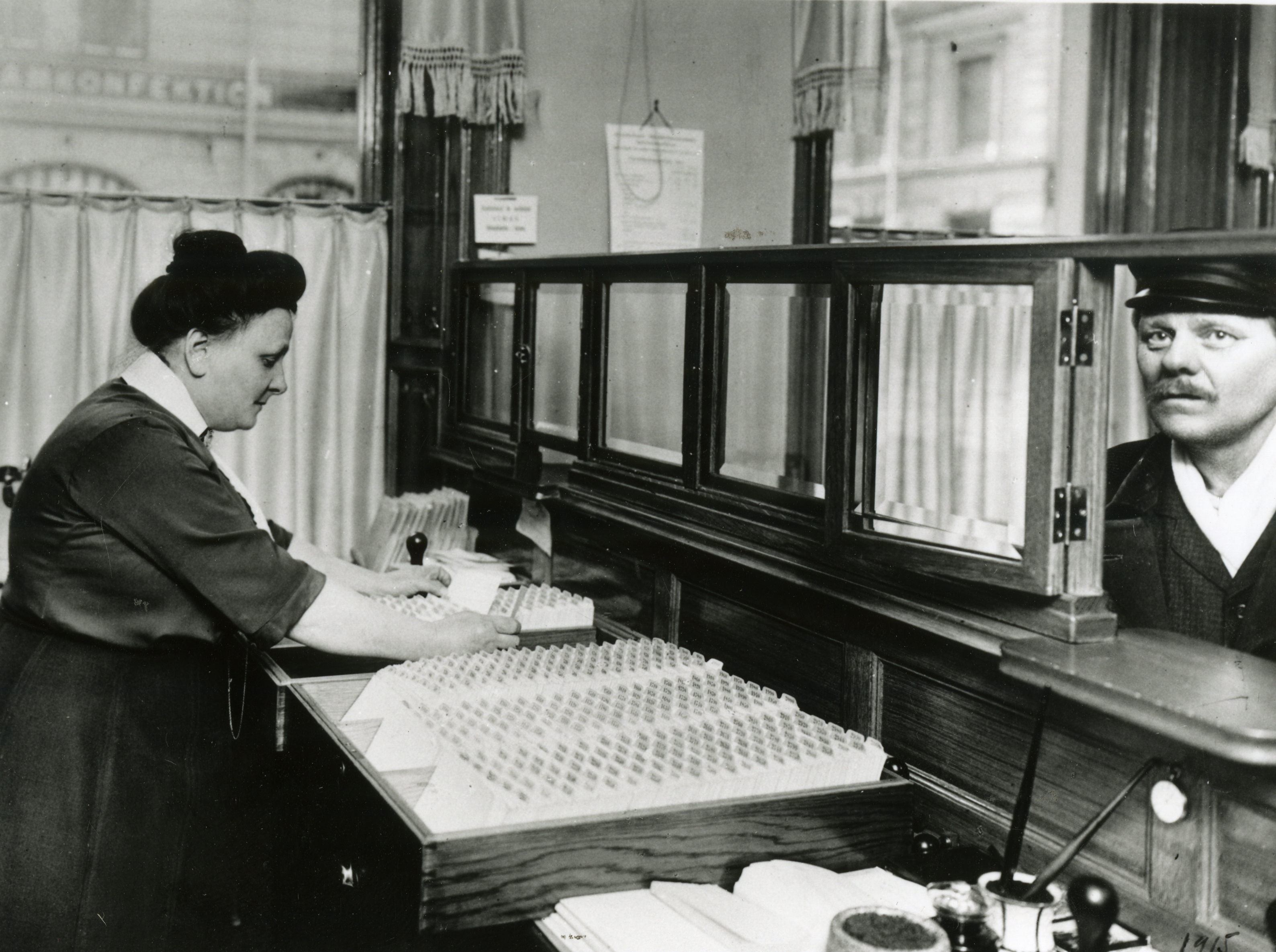 Kvinna bläddrar i motboksregistret